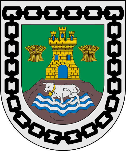 Escudo de Riaño Valle de Valdebezana